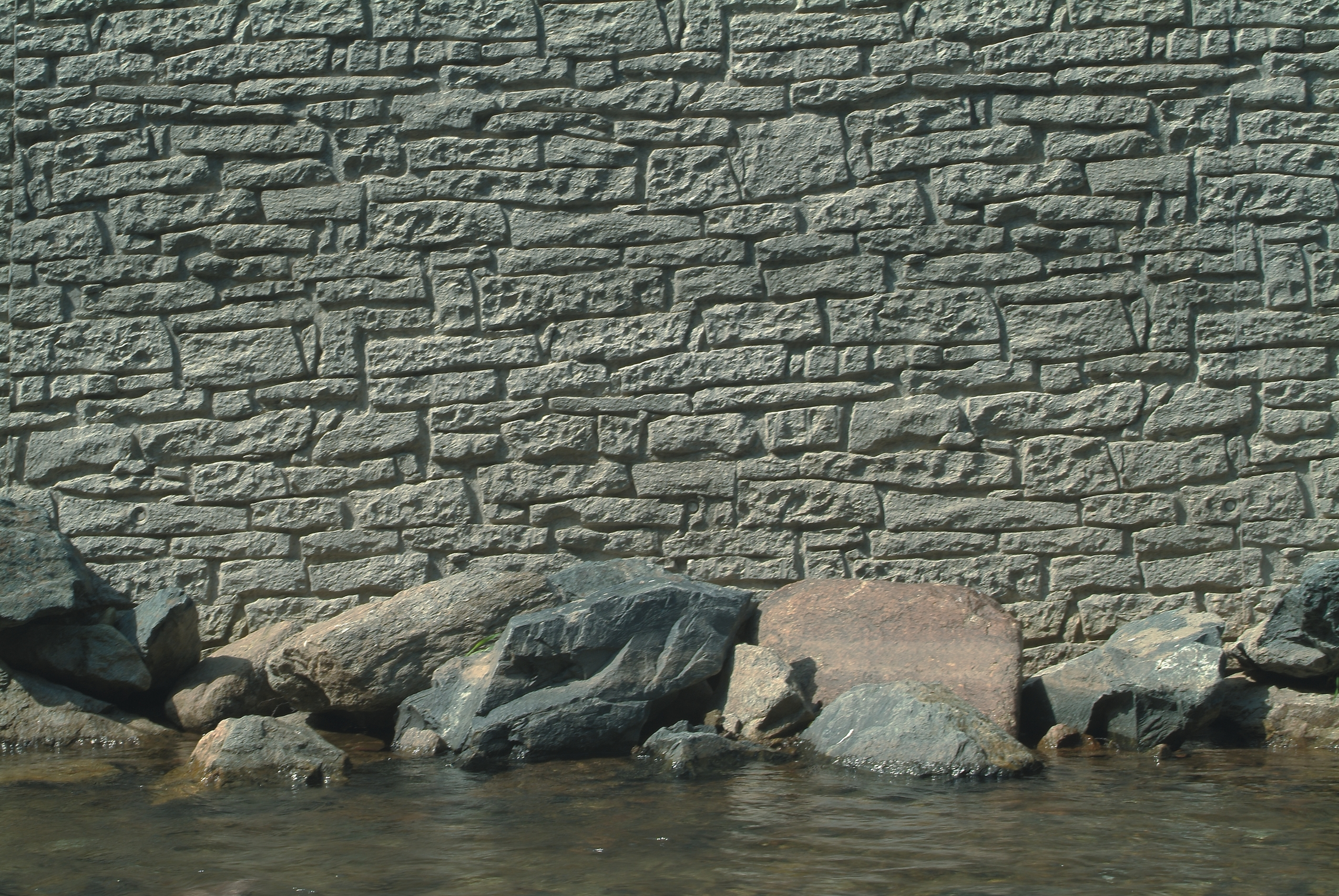 Naturstein-Mauerwerk oder Beton? Stützmauer betoniert mit einer Strukturmatrize die einem Trockenmauerwerk nachempfunden wurde.